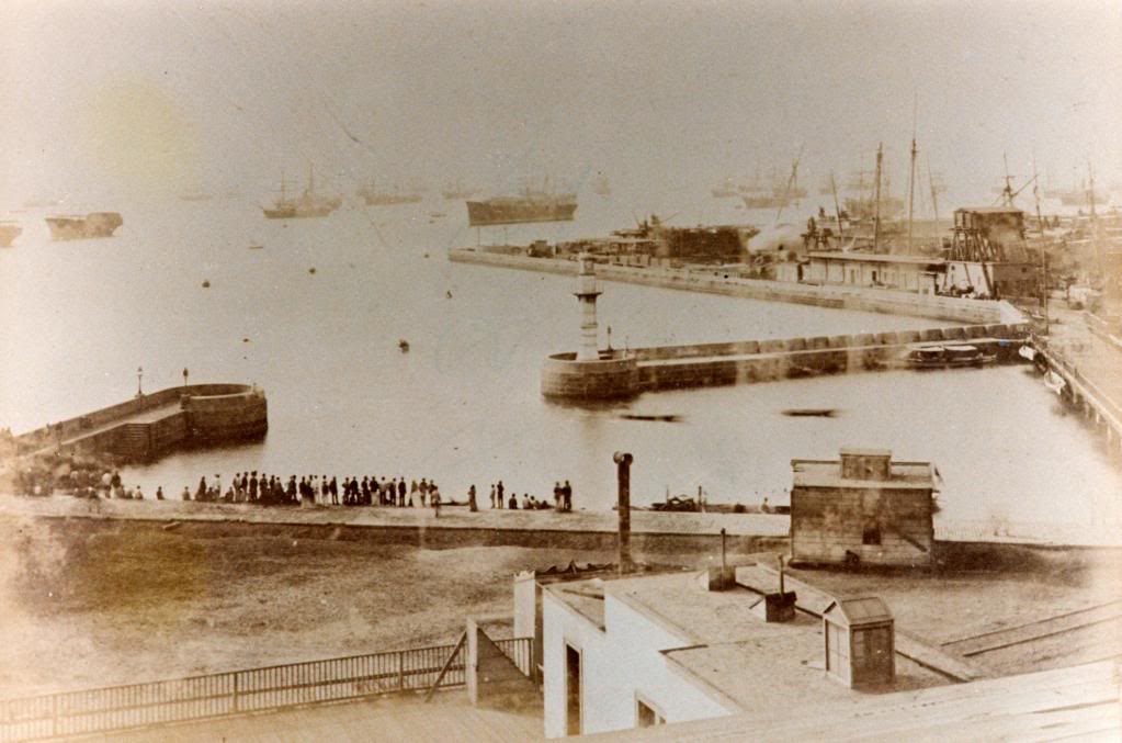 El Callao, Peru, durante la Guerra del Pacifico, muelle de la darsena con el transporte Rimac dañado